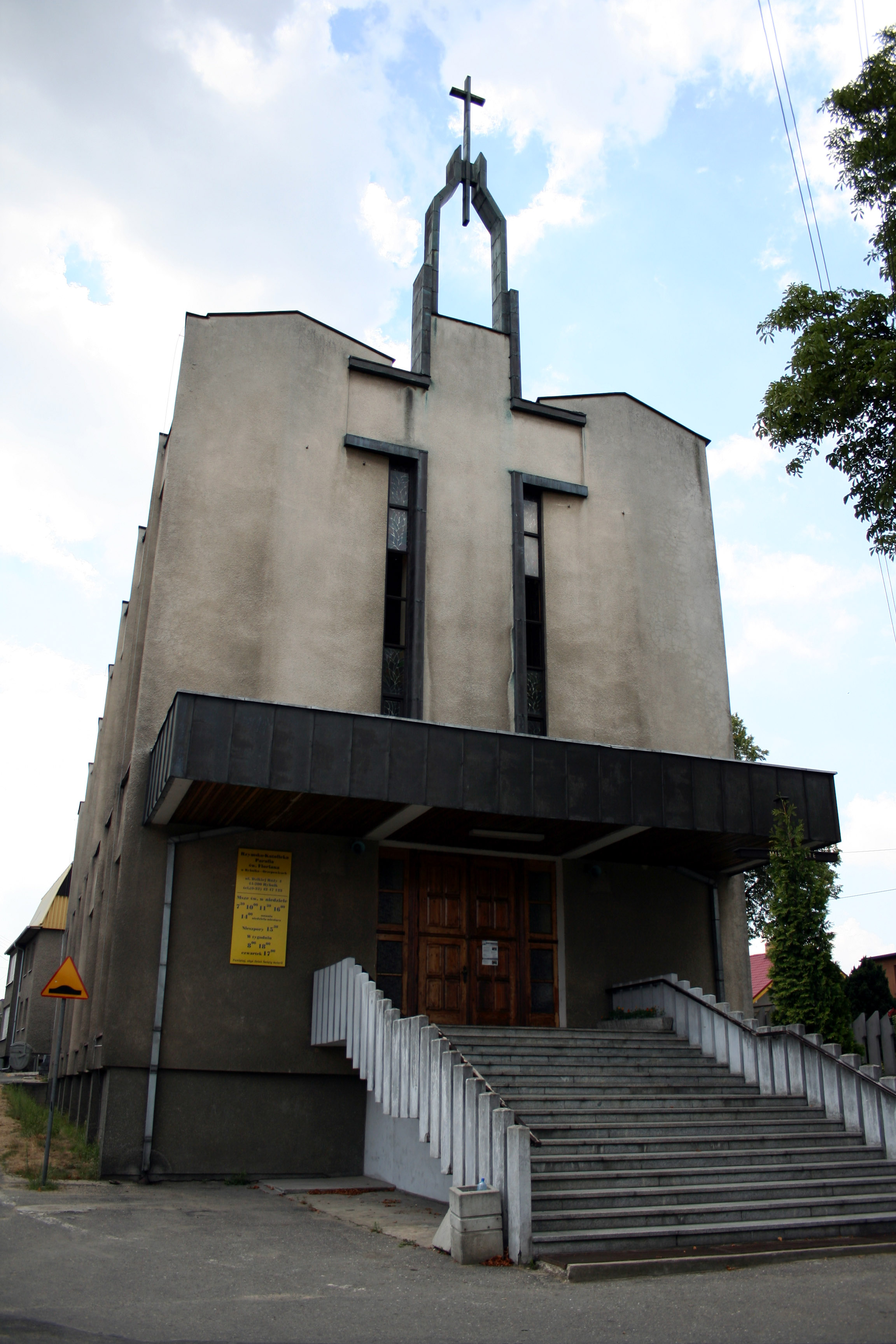 Kostel sv. Floriána v Rybniku-Orzepowicích